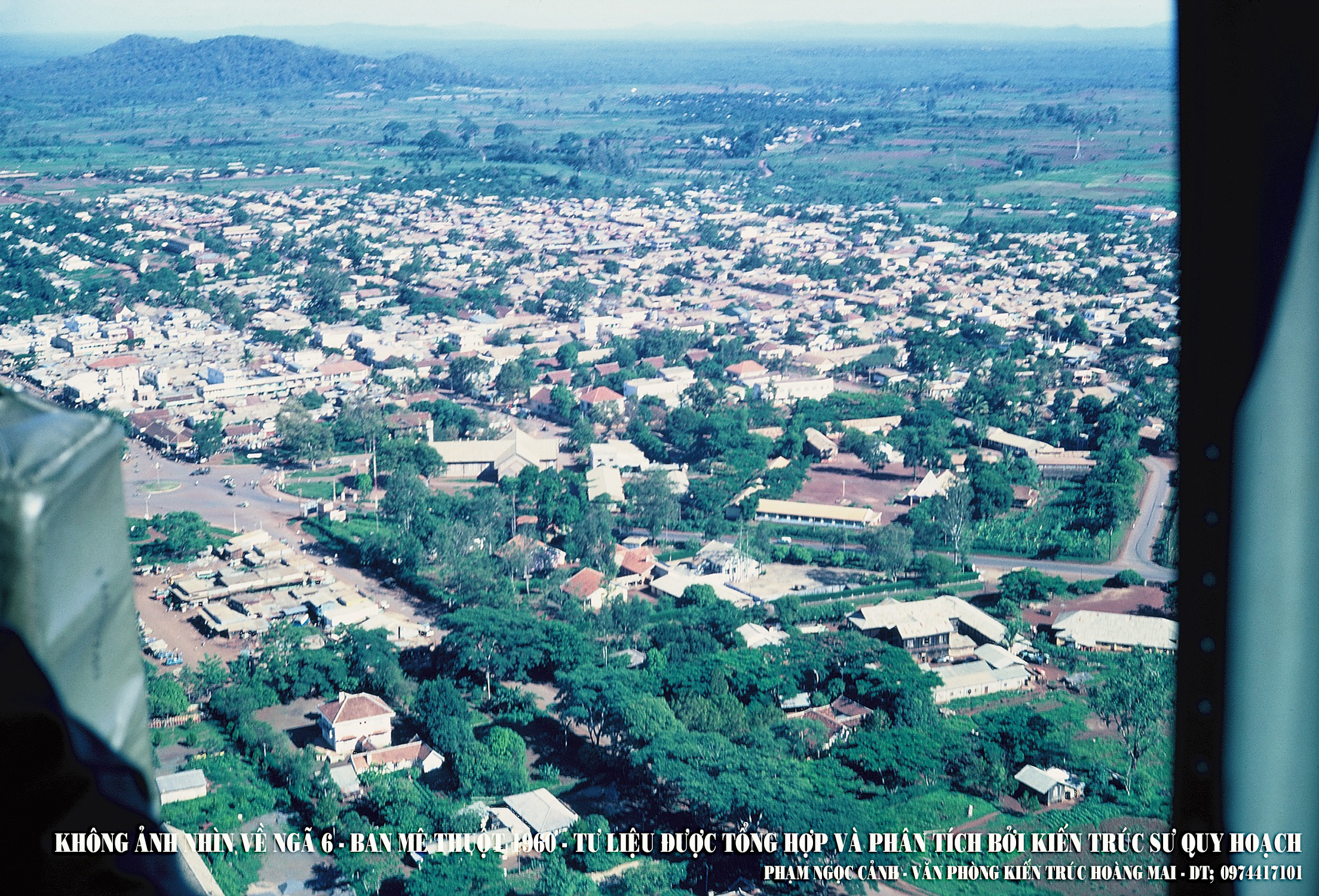 Không ảnh nhìn về ngã 6 - Ban Mê Thuột - 1969